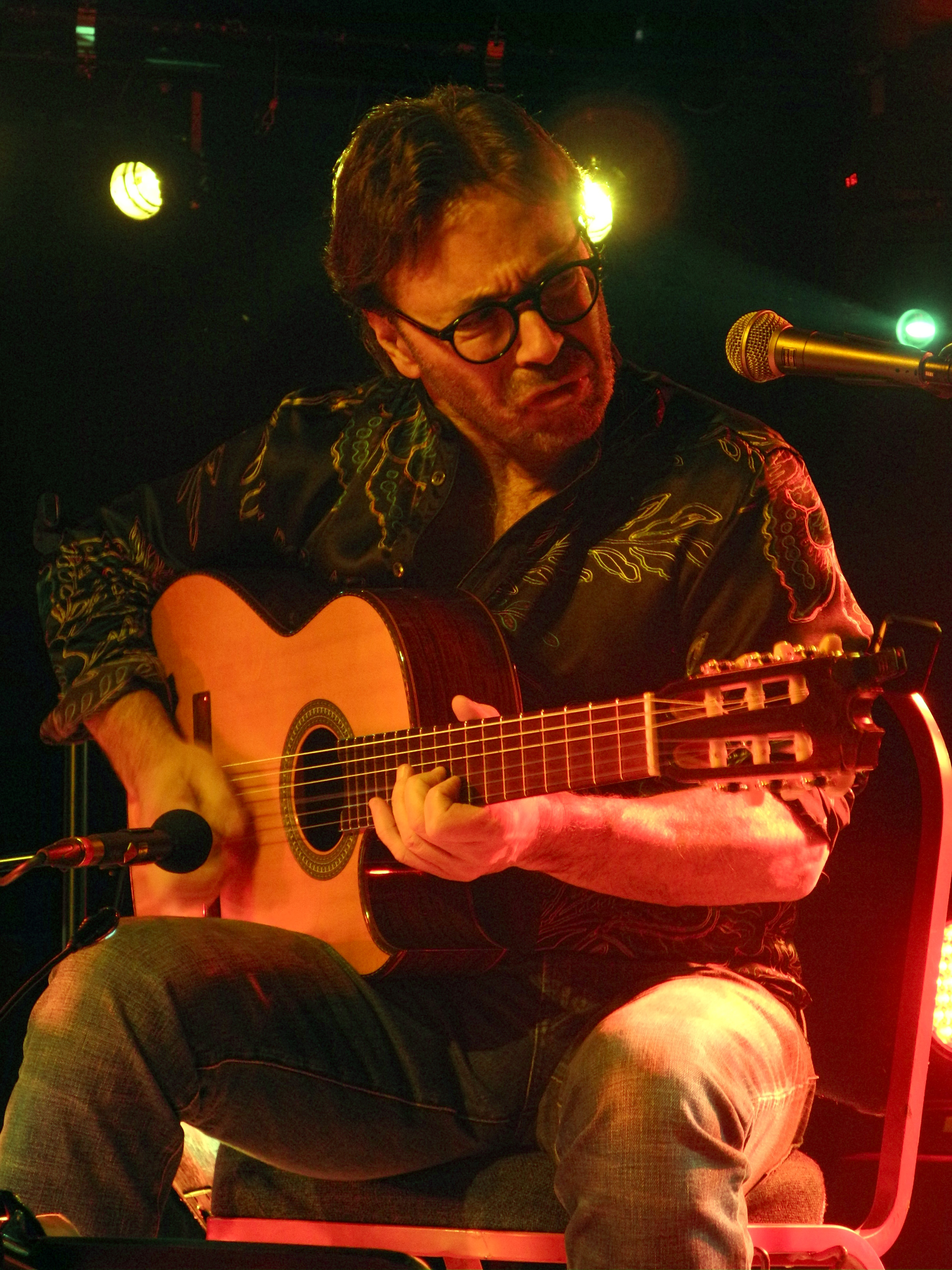 Il chitarrista jazz fusion Al di Meola al 'Den Atelier', Luxembourg